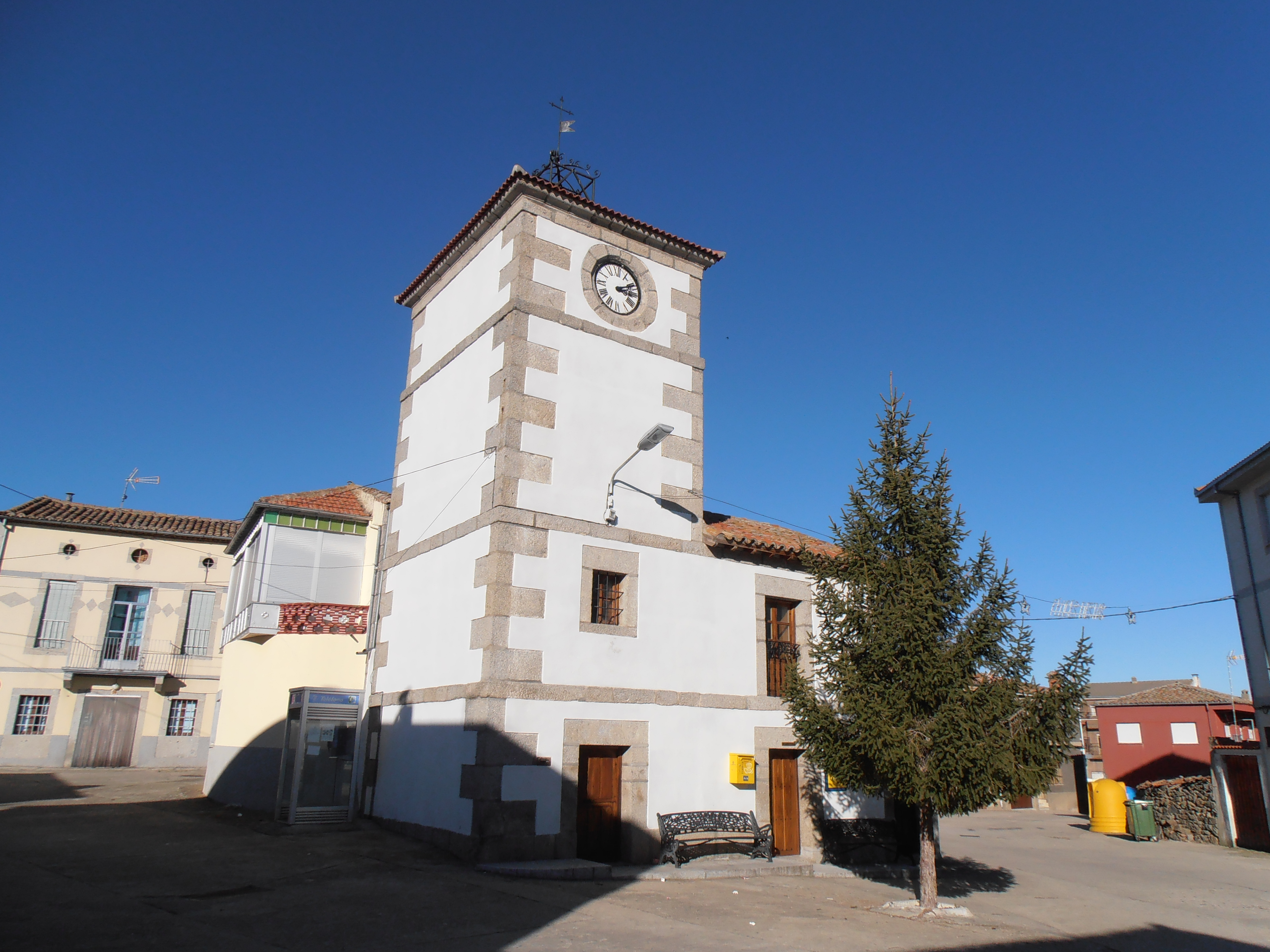 reloj municipal